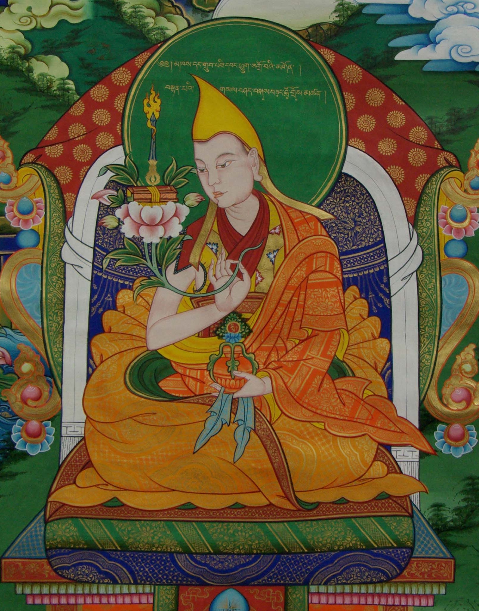 The Ninth Kirti, Kelzang Lodro Kunga Lungtok Gyatso b.1905 - d.1920